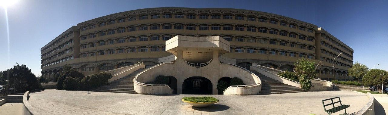 Alzahra Hospital in Isfahan